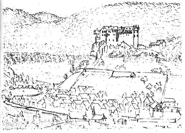 Ansicht von Bilstein auf einer Federzeichung im 18. Jahrhundert.